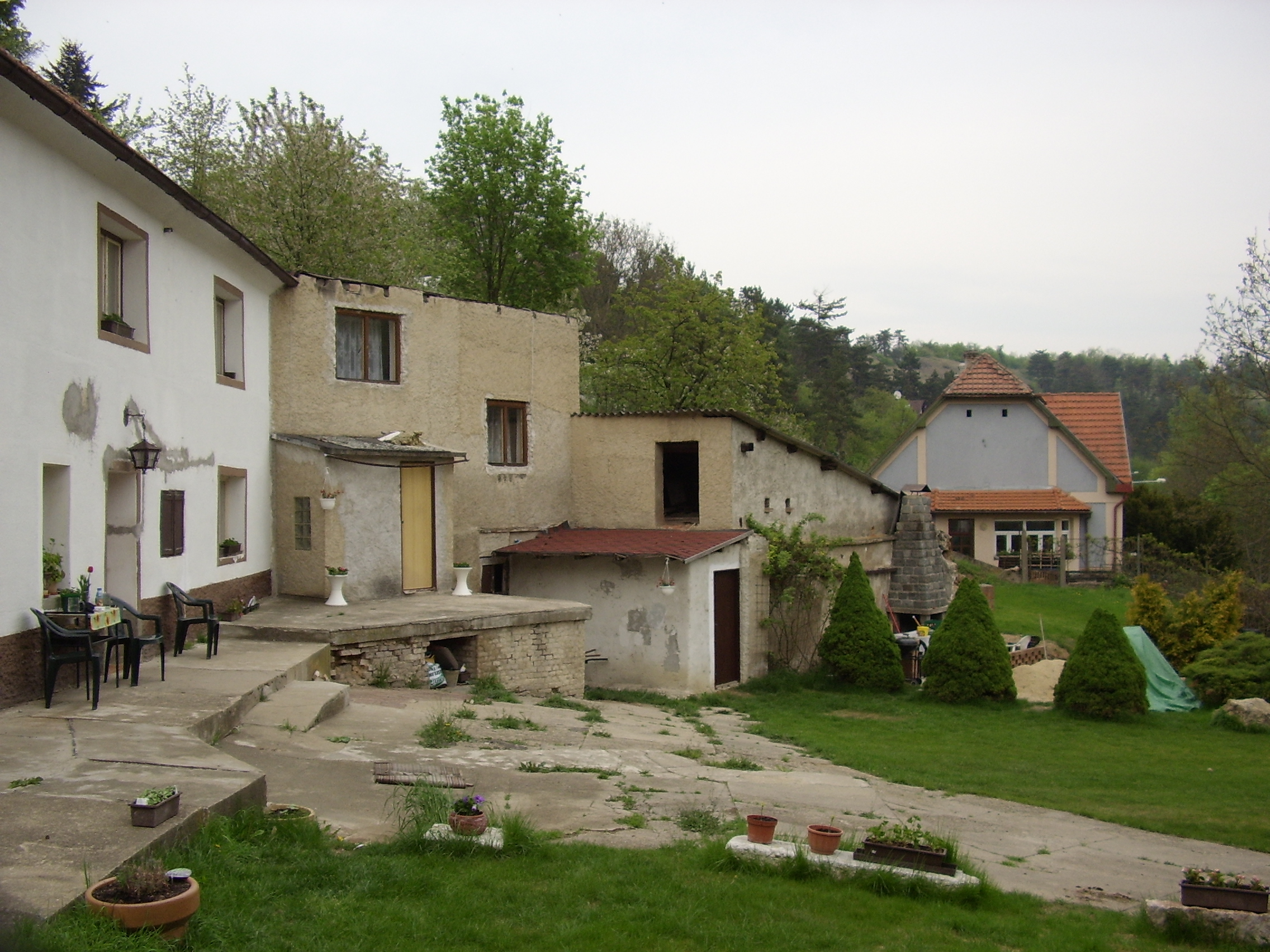 Praha-Jinonice, Nová Ves, nová zástavba